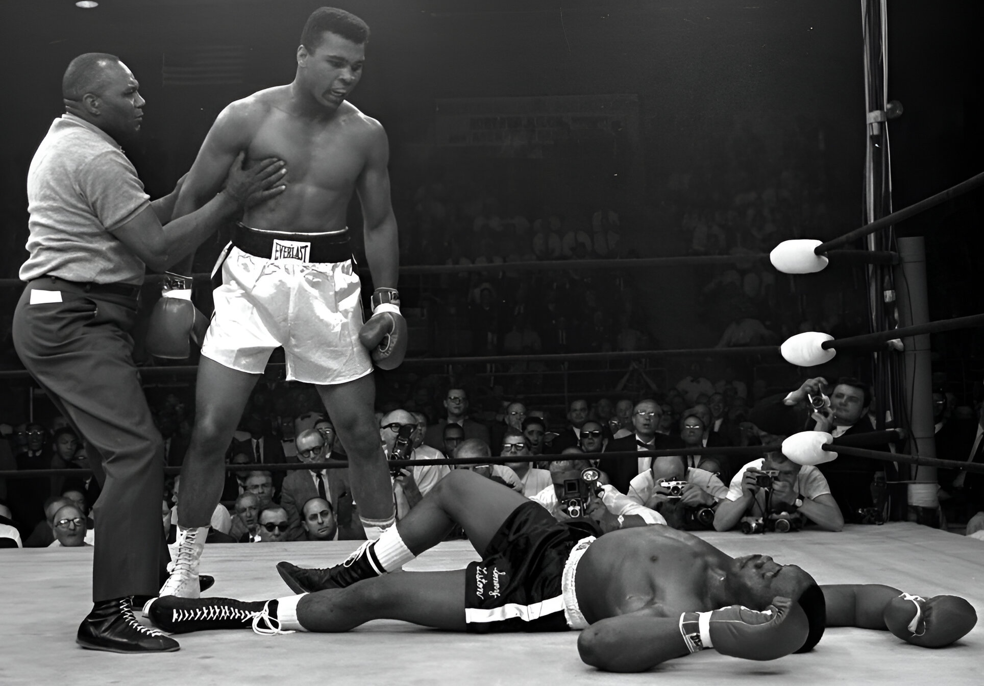 Øyeblikket rett etter Clay har slått Liston